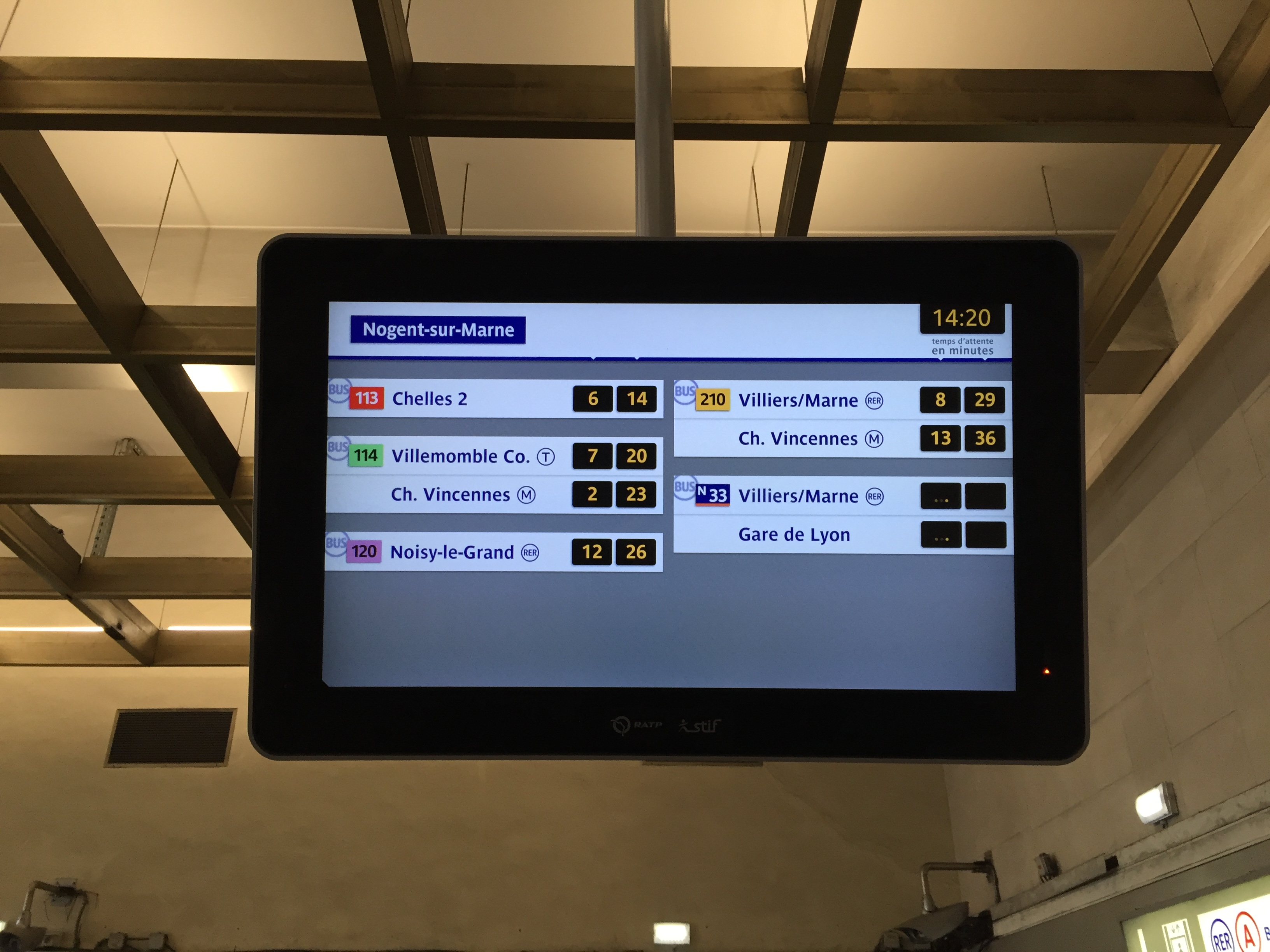 Écran SIEL pour les bus à la sortie de la gare RER de Nogent-sur-Marne.